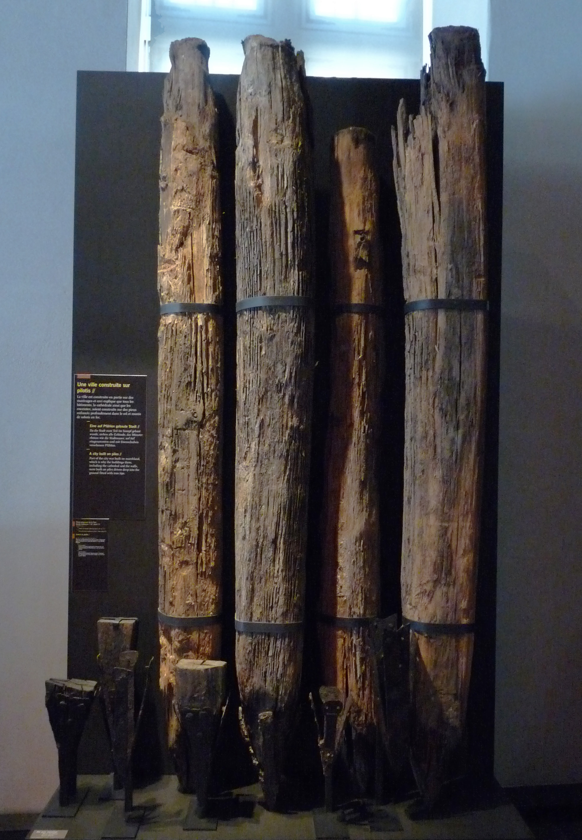 Pilotis provenant de la Tour Sainte-Catherine. Strasbourg. 14e siècle + sabots de pilotis trouvés au Brückhof et rue Sainte-Hélène. Musée historique de Strasbourg